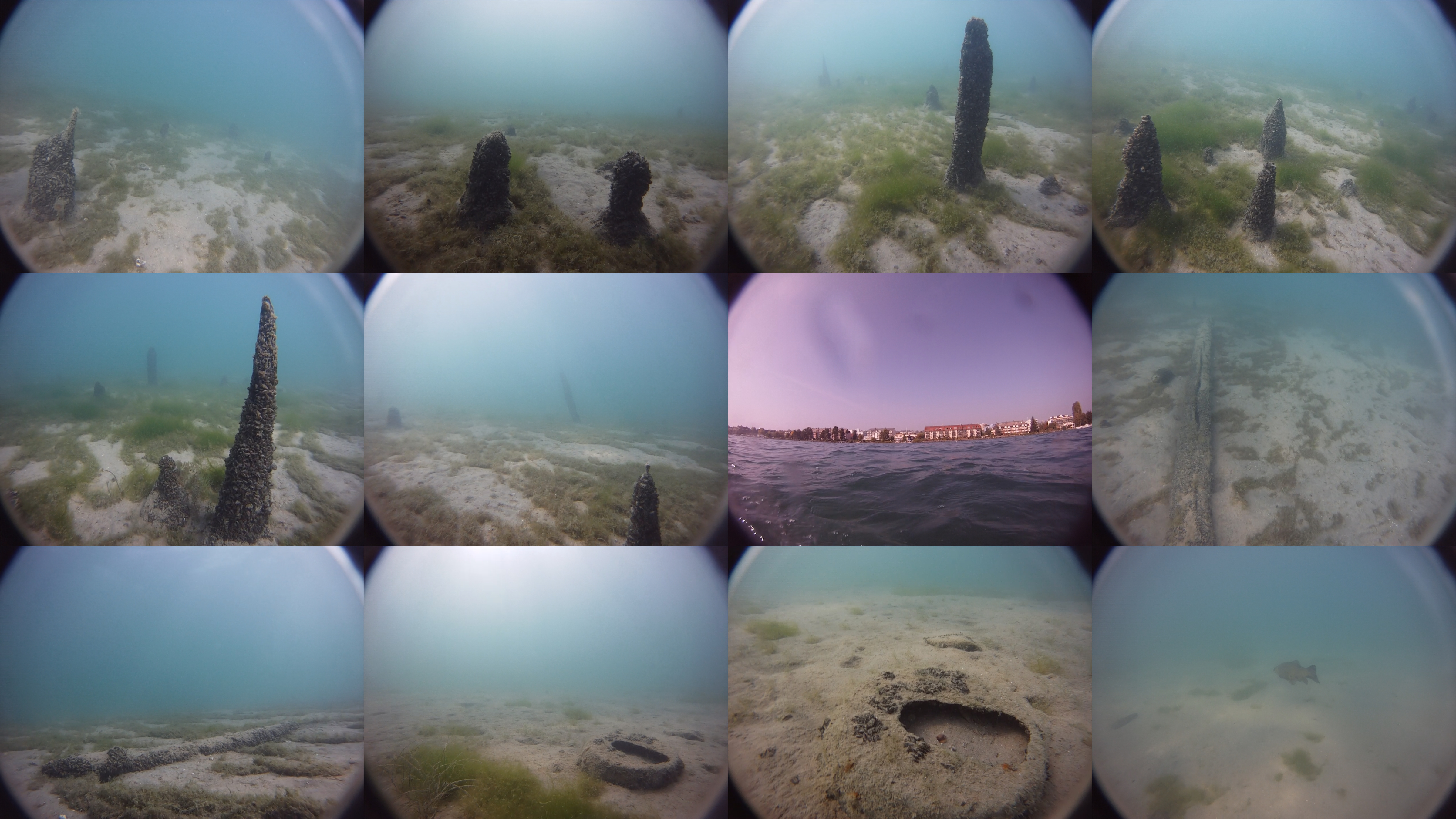 Capture d'une vidéo réalisée avec une GoPro (lentille plate) sur le site "Les Roseaux" des Stations de Morges, classé à au patrimoine mondiale de l'UNESCO. (CH-VD-11) Assemblage des images : je l'ai crée ainsi pour représenter d'une part que ces captures sont extraites d'une vidéo et d'autres part cela symbolise le réseau de construction. Une image est faite à la surface de l'eau, en dessus du site, on y aperçoit l'hôtel du Lac entre autres Cette prise d'images a été faite le 30 septembre 2011 en snorkinng, la température du lac avoisinait les 20°C, extraordinaire pour une fin septembre! Il n'est pas certains que tous les objets soient des objets "classés", en particulier l'objet sur les deux images en bas au centre. A droite en bas, un joli poisson (le nom?), un habitant qui était dans la zone.